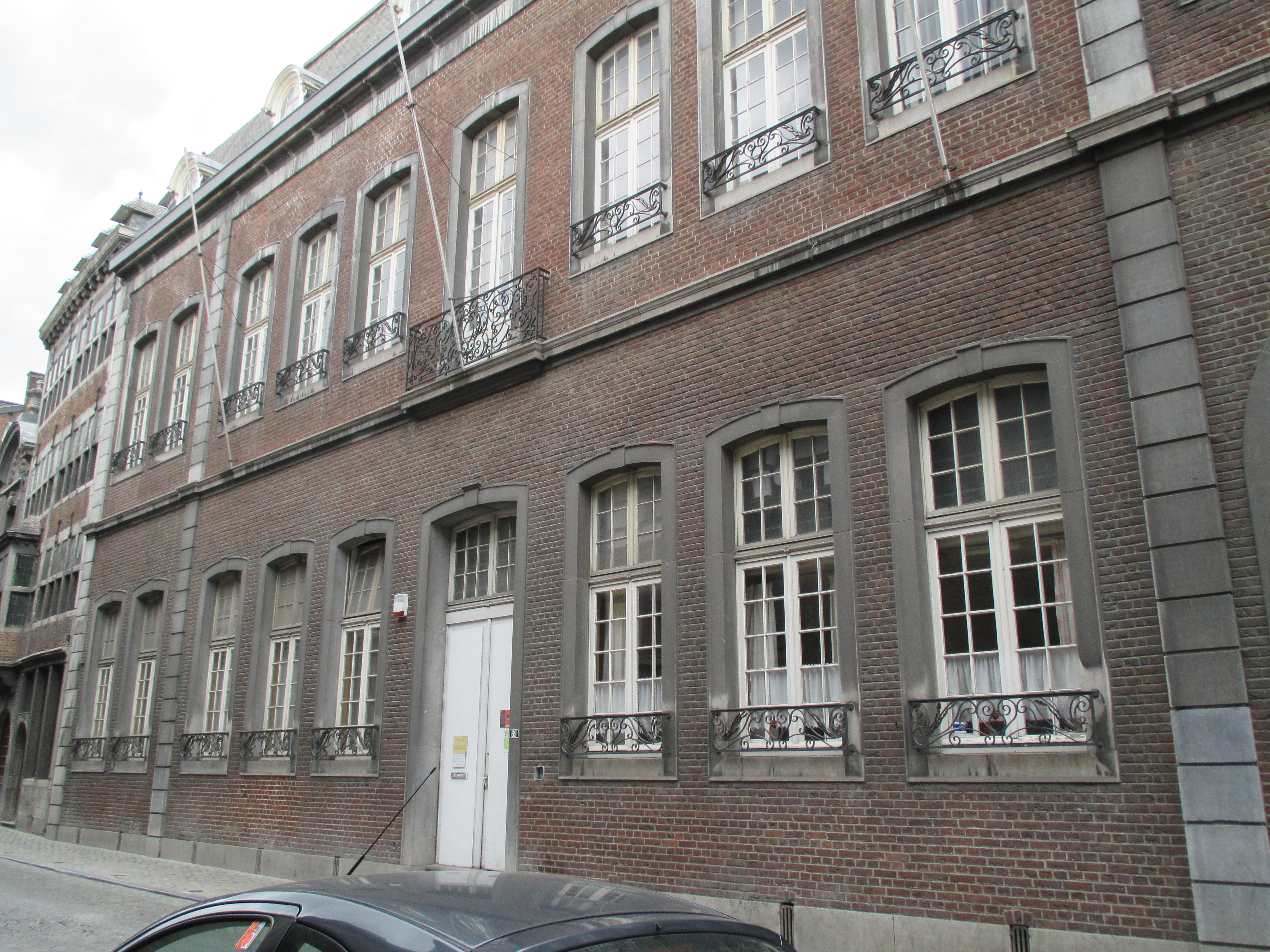 Siège de la société Vieux-Liège dans la rue Hors-Château